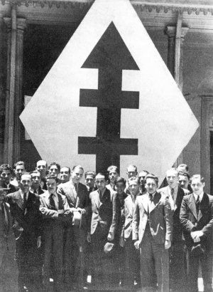 Eduardo Frei : el hombre que siempre va conmigo / Fundación Eduardo Frei. Santiago : La Fundación, 1991 (Santiago : Salesianos) 266 p.